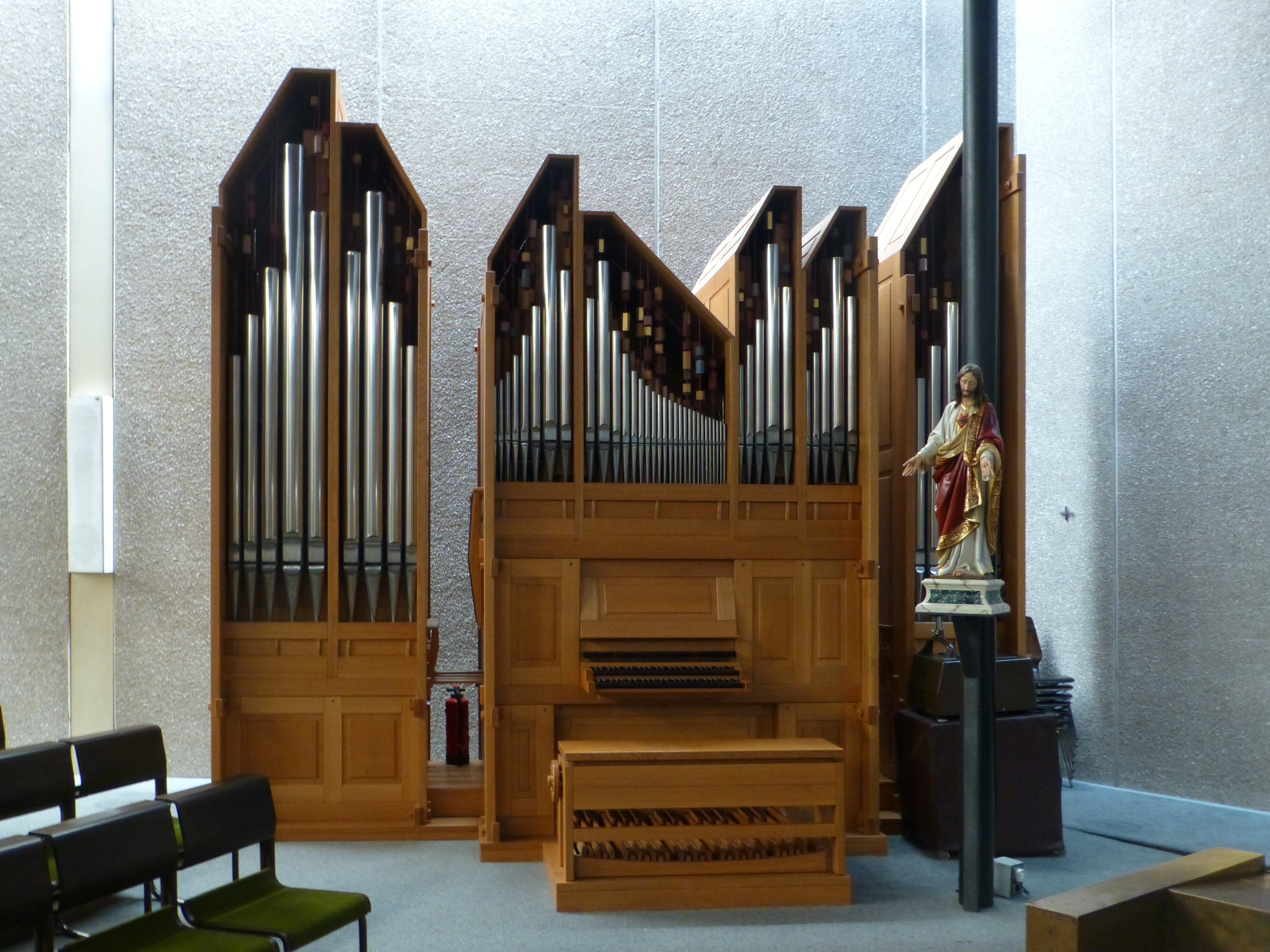 Orgel in der Guthirtenkirche in Lustenau